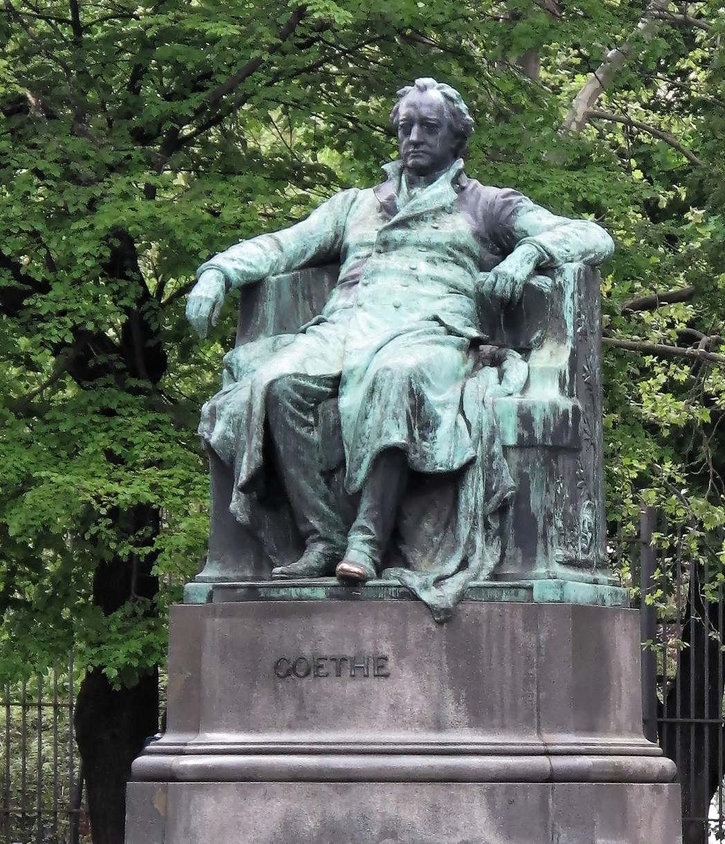 Statue de Goethe à Vienne